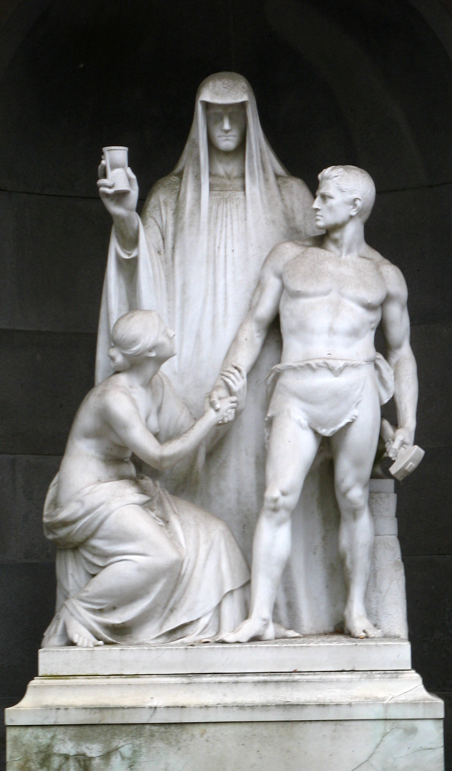 Memento Mori - Grabmal Familie Eduard Bartling (1845-1927). Bildhauer: Ernst Herter. Nordfriedhof Wiesbaden